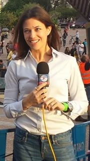 תמר אלמוג בשידור חי מכיכר רבין 2014